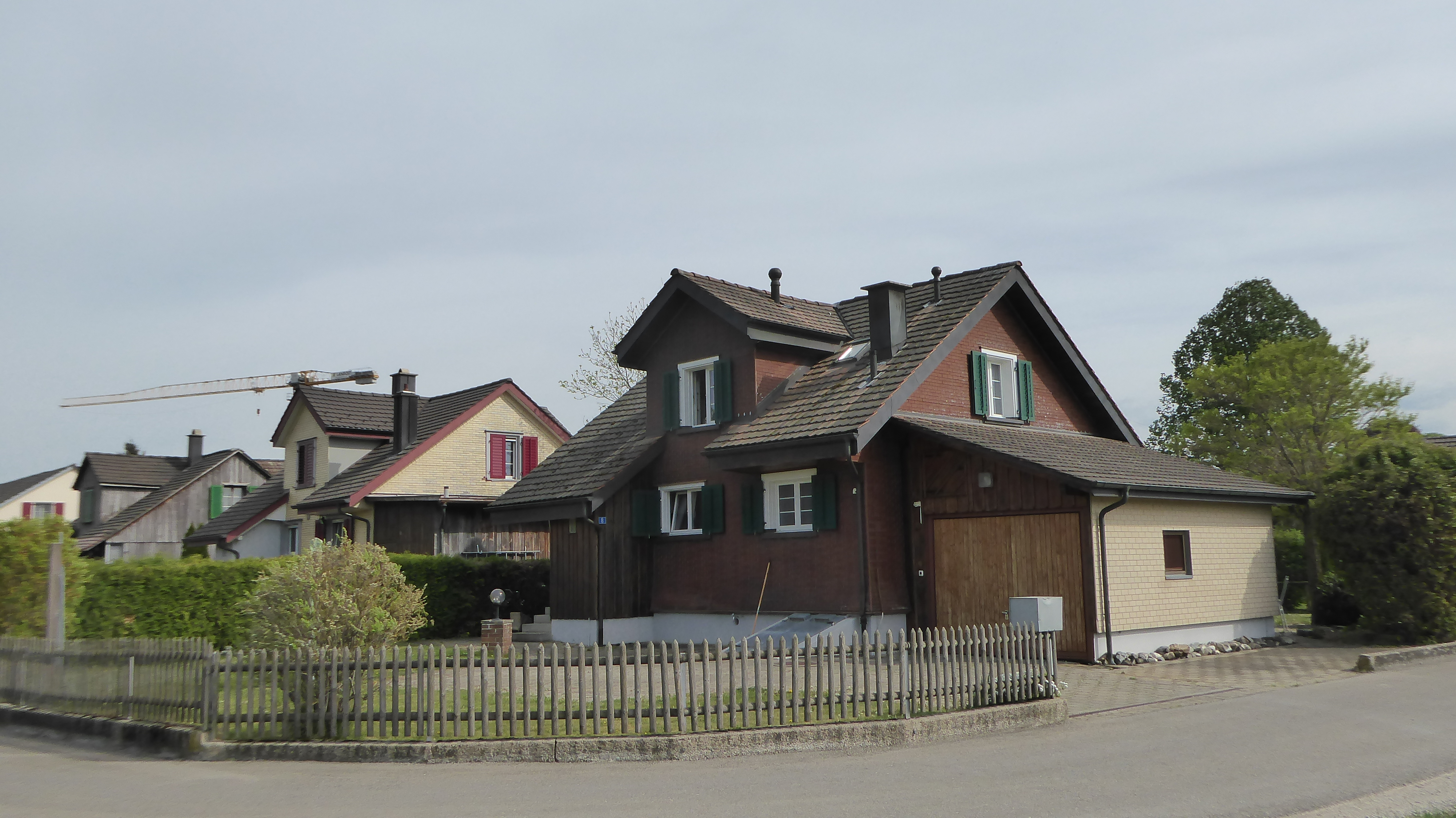 Grüneck TG